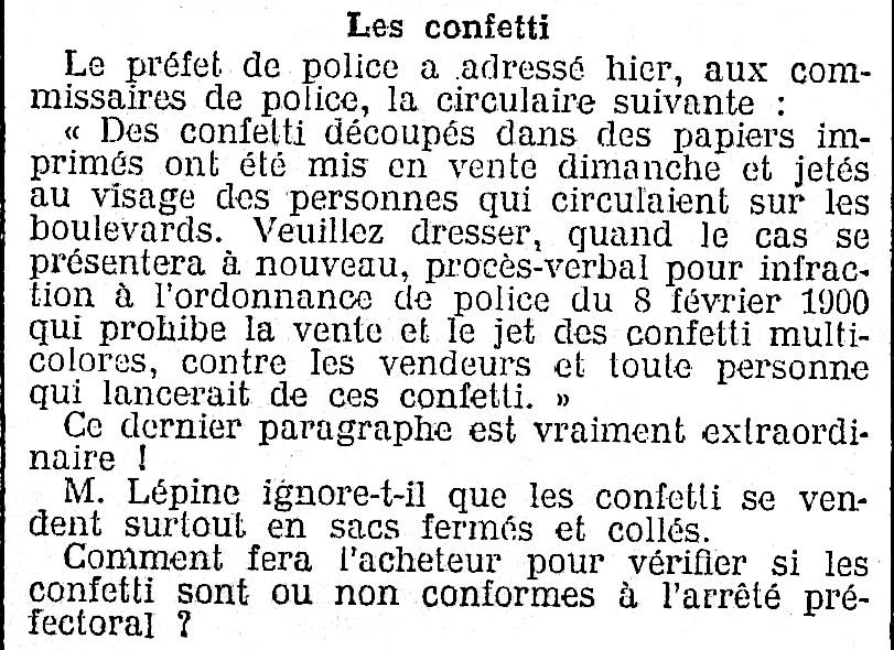 A propos des confettis.